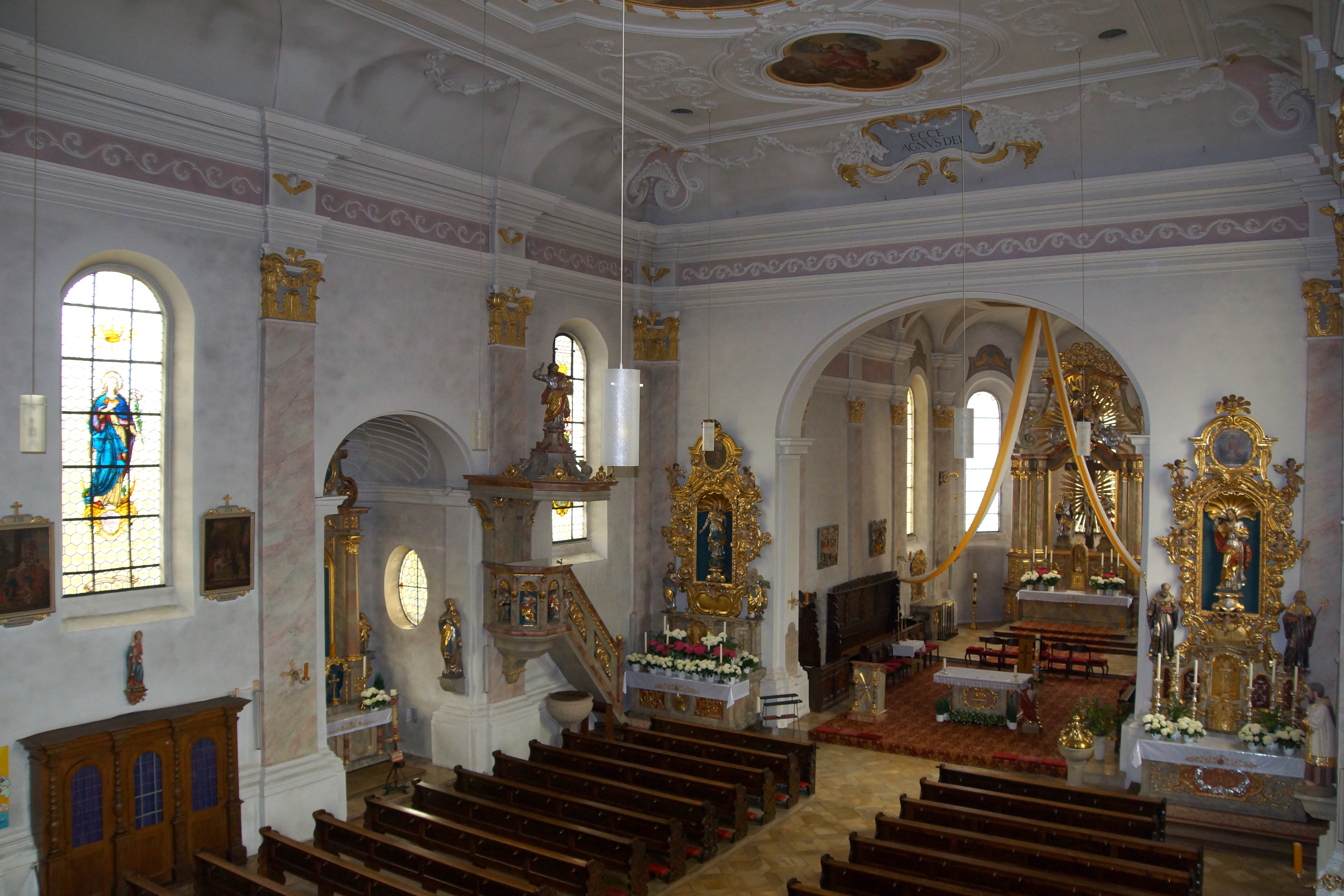 Die katholische Pfarrkirche St. Johannes der Täufer in Hemau in der Oberpfalz